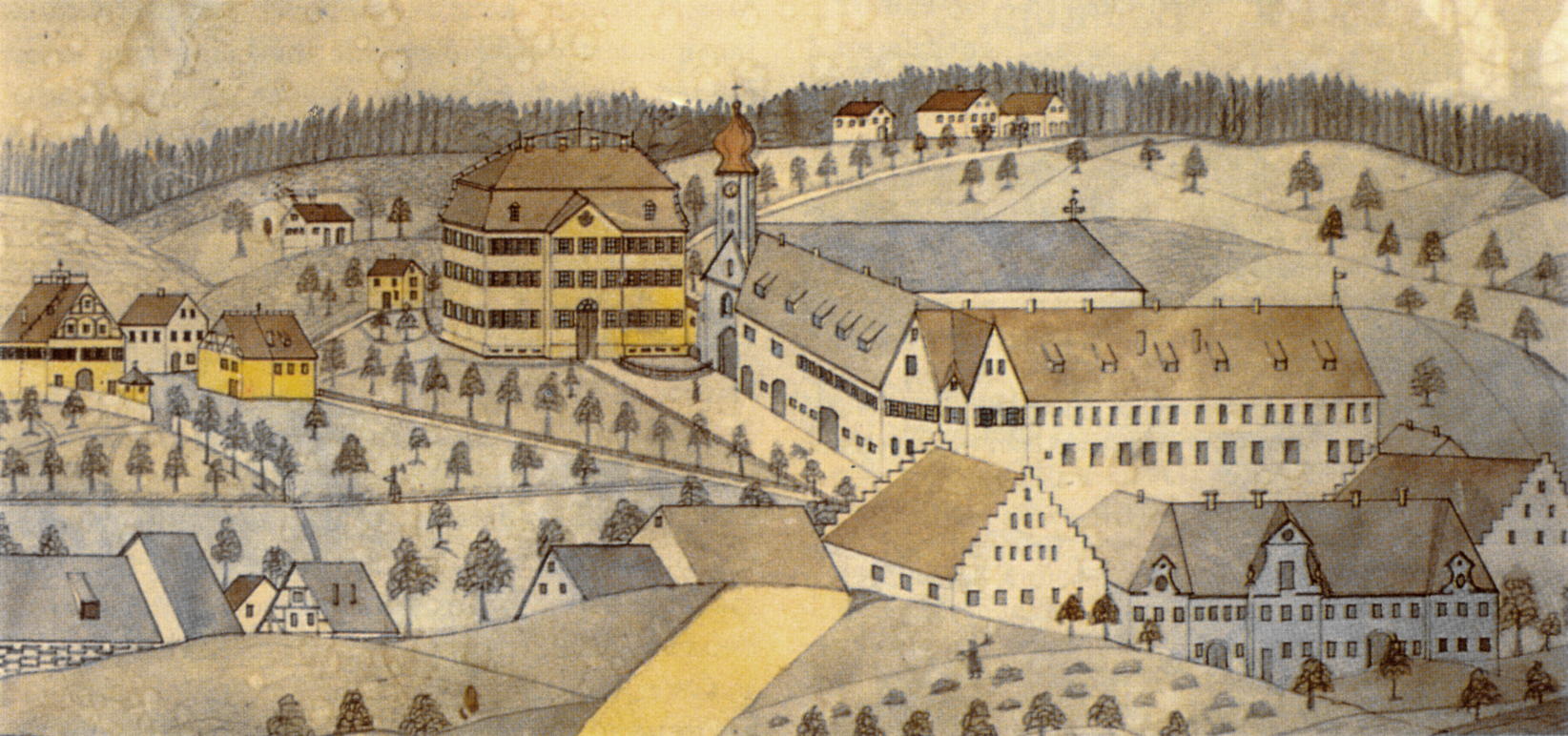 Baindt, 1889 gezeichnet vom Baindter Maurermeister Bonifaz Schützbach (* um 1839) nach einer älteren Vorlage.